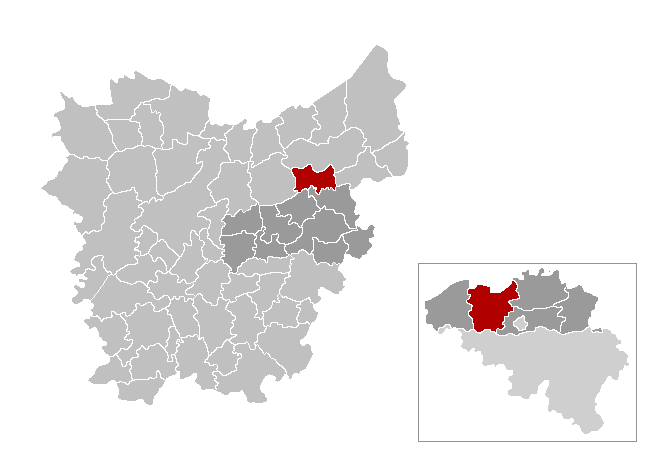 Gemeentekaart, eigen werk Categorie:Kaart met locatie Belgische gemeente